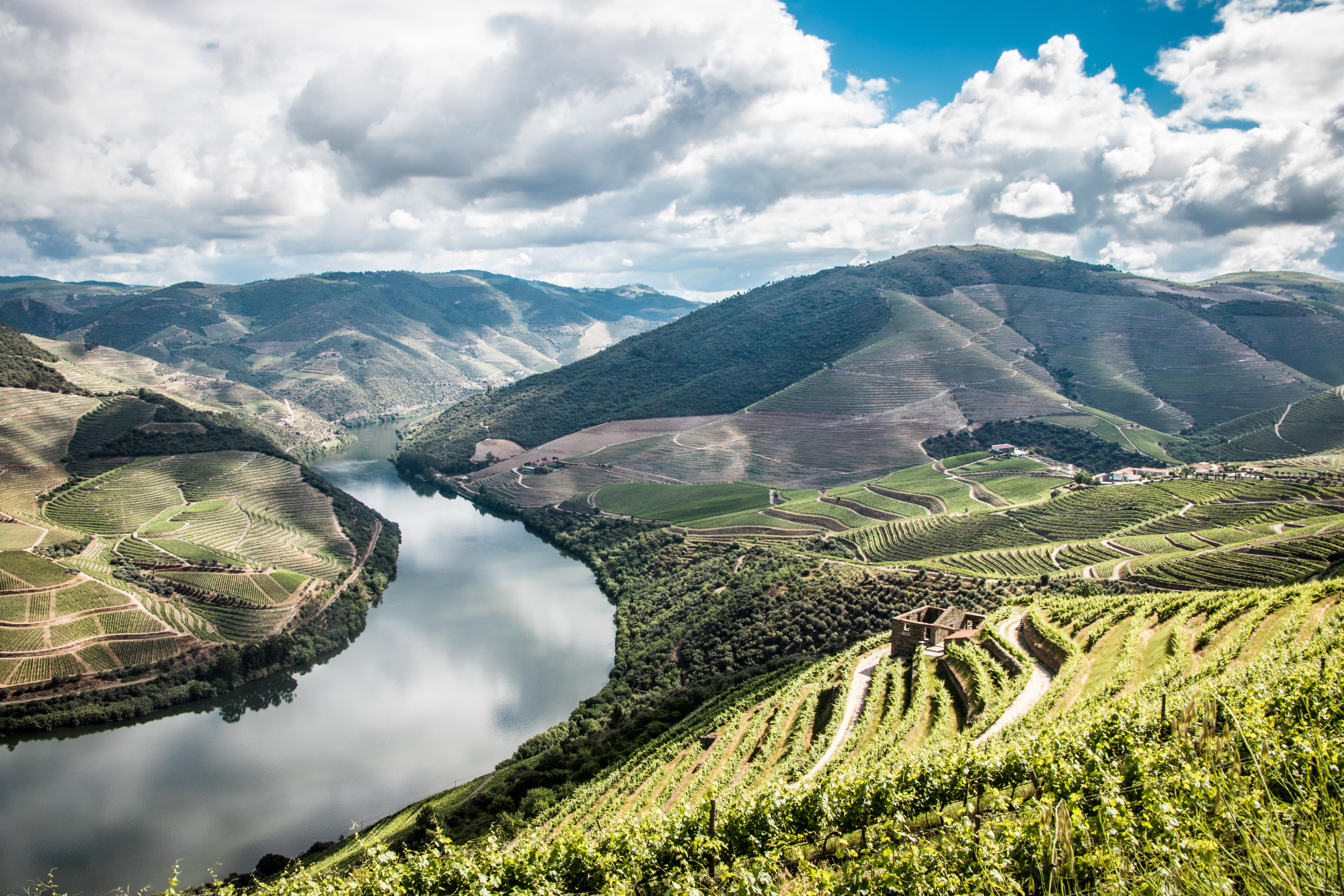 Foto tirada em Ventozelo, Ervedosa do Douro